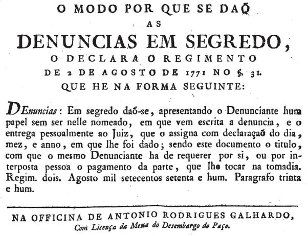 «O modo por que se dão as "Denúncias em Segredo"». (Lei de 2 de Agosto de 1771 (§31). Promulgada pelo Marquês de Pombal)